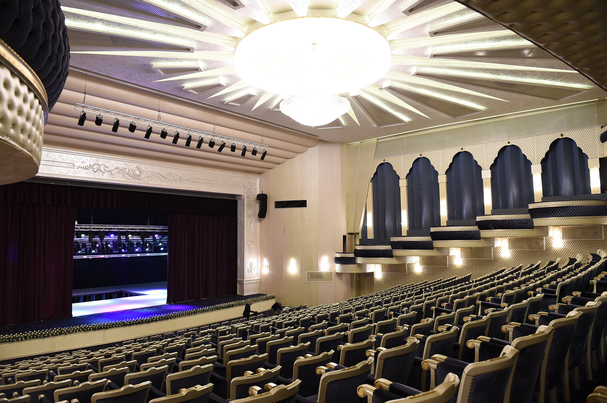 Ganja State Philharmonic Hall interior